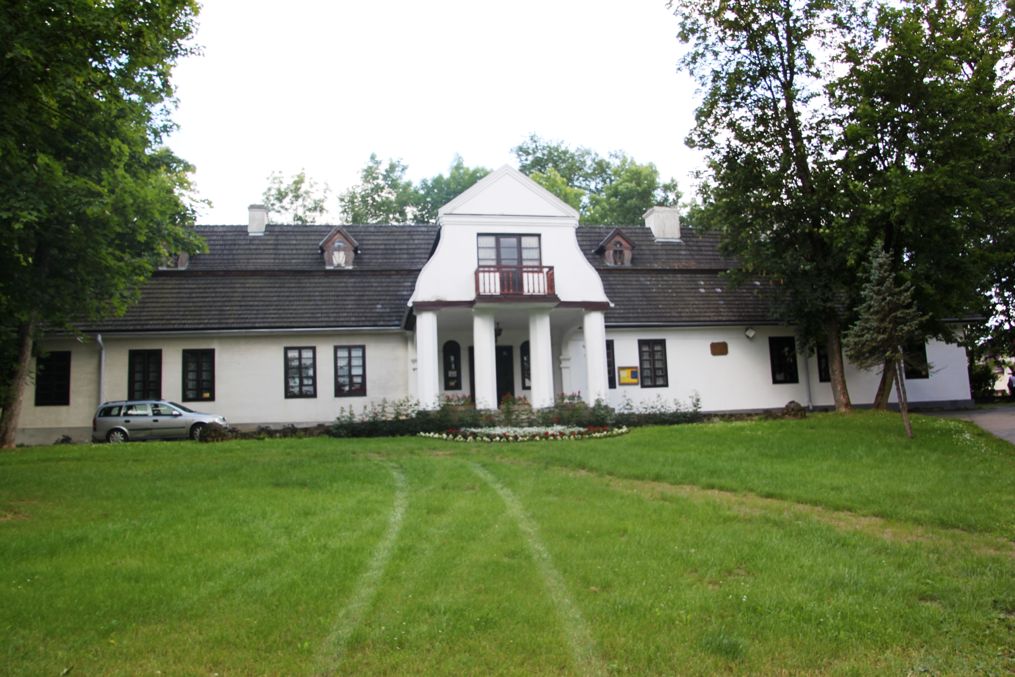 Limanowa, dwór, XVIII, XX